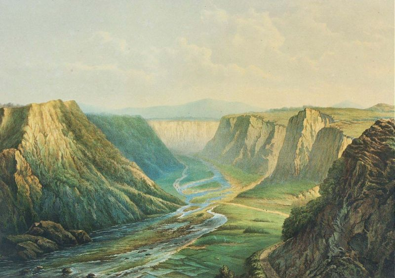 Litho. Litho naar een oorspronkelijke tekening van C. T. D. Deeleman. Pagina 19 van de map "De Indische Archipel", Den Haag, 1865-1876 met daarin 24 kleurenlitho's, van objectnr. 3728-430 t/m 3728-479.. Het karbouwengat